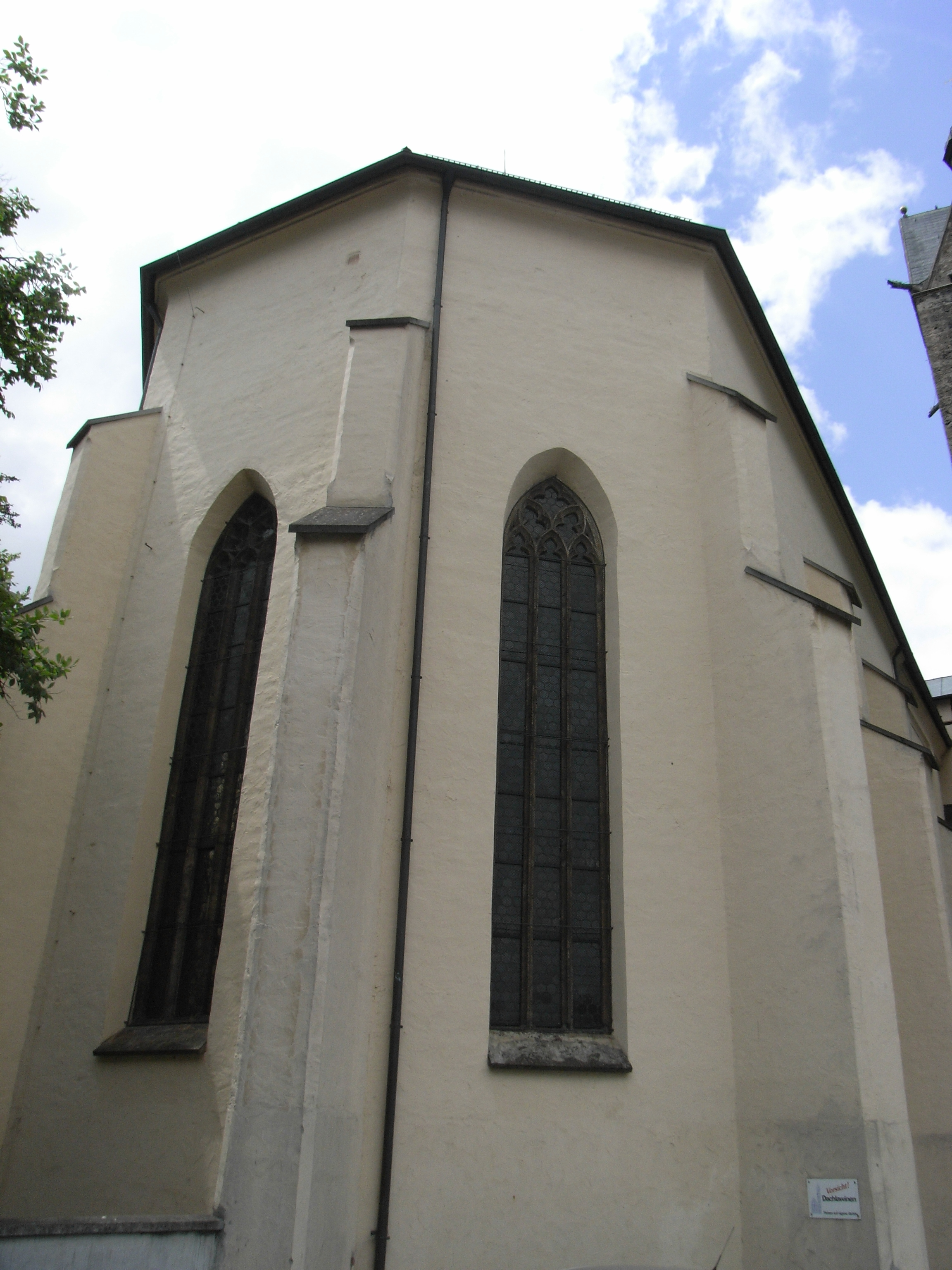 Chor mit Turm der Kirche Unser Frauen zu Memmingen